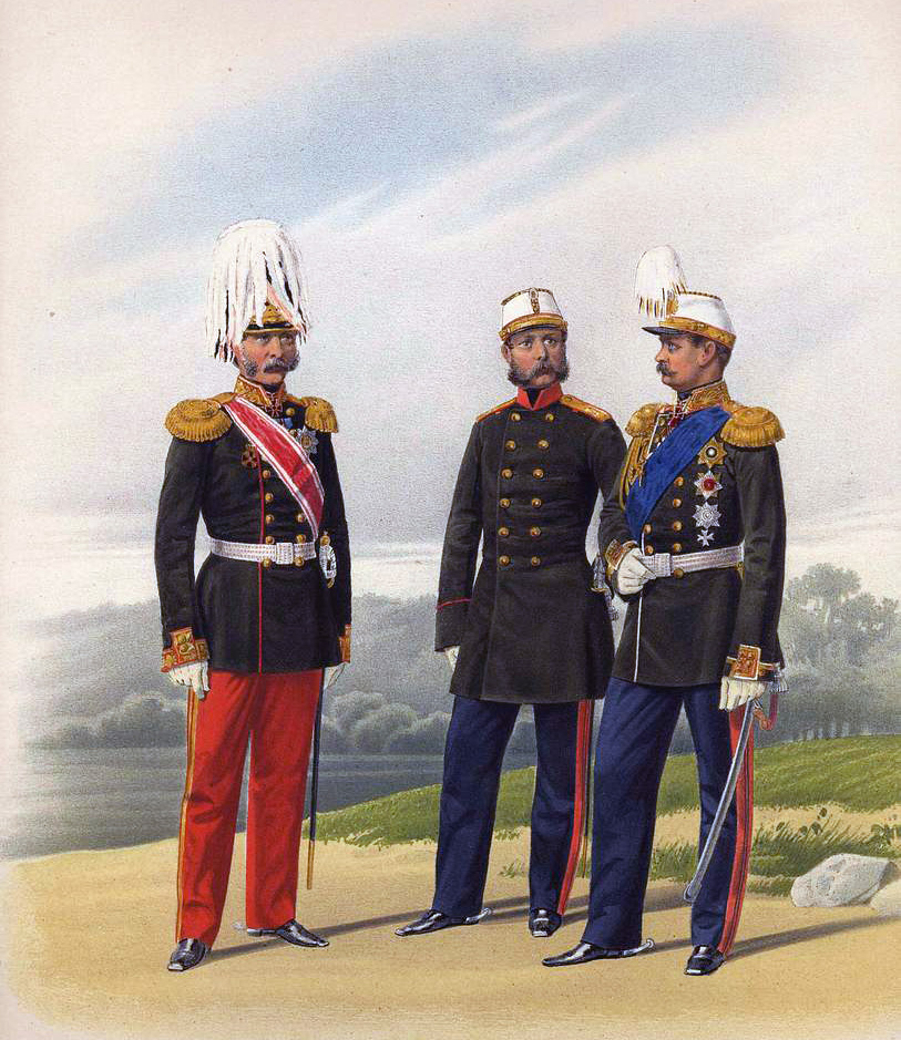 Пехотные Генералы и Генерал-Адъютант, 2 марта 1862. (В городской парадной, в вседневной и в походной парадной формах).